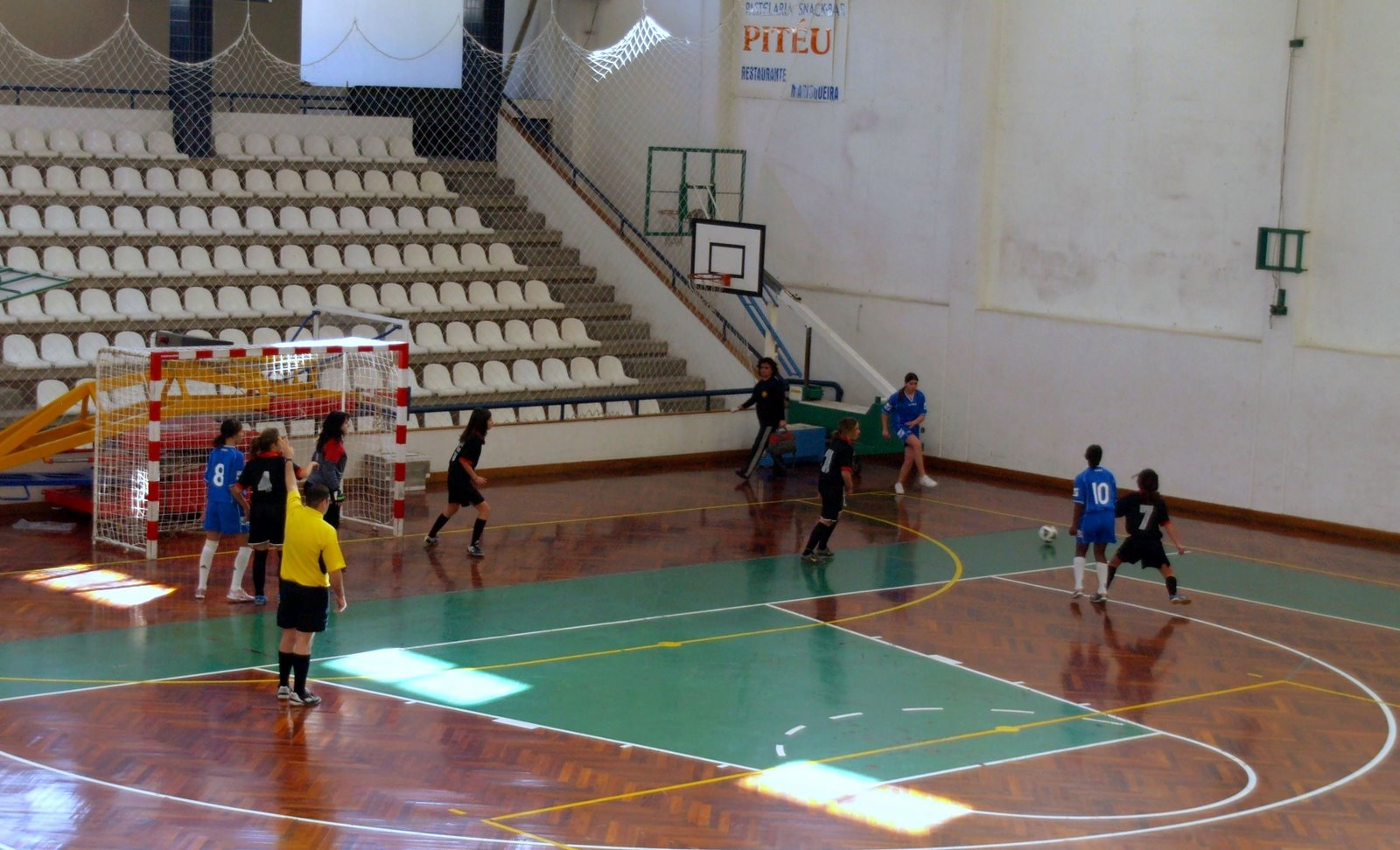 "Este torneio, organizado pela Junta de Freguesia da Sé, decorreu no Pavilhão do Sporting Clube Farense, dia 9 de Março de 2008 e no âmbito do Dia Mundial da Mulher."